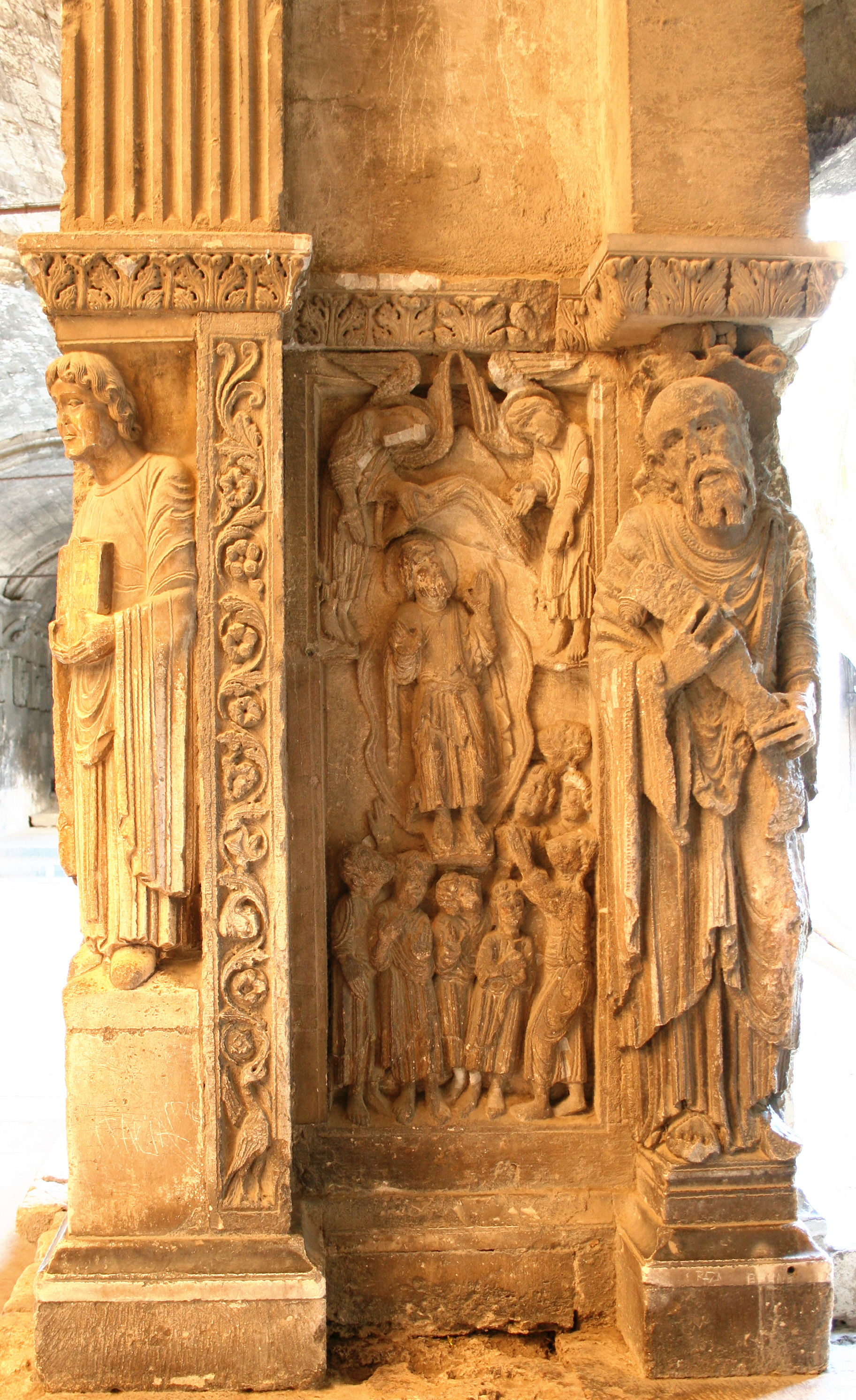 Pilier nord-est du cloître Saint-Trophime à Arles représentant de gauche à droite : saint Etienne, l'Ascension et saint Paul.